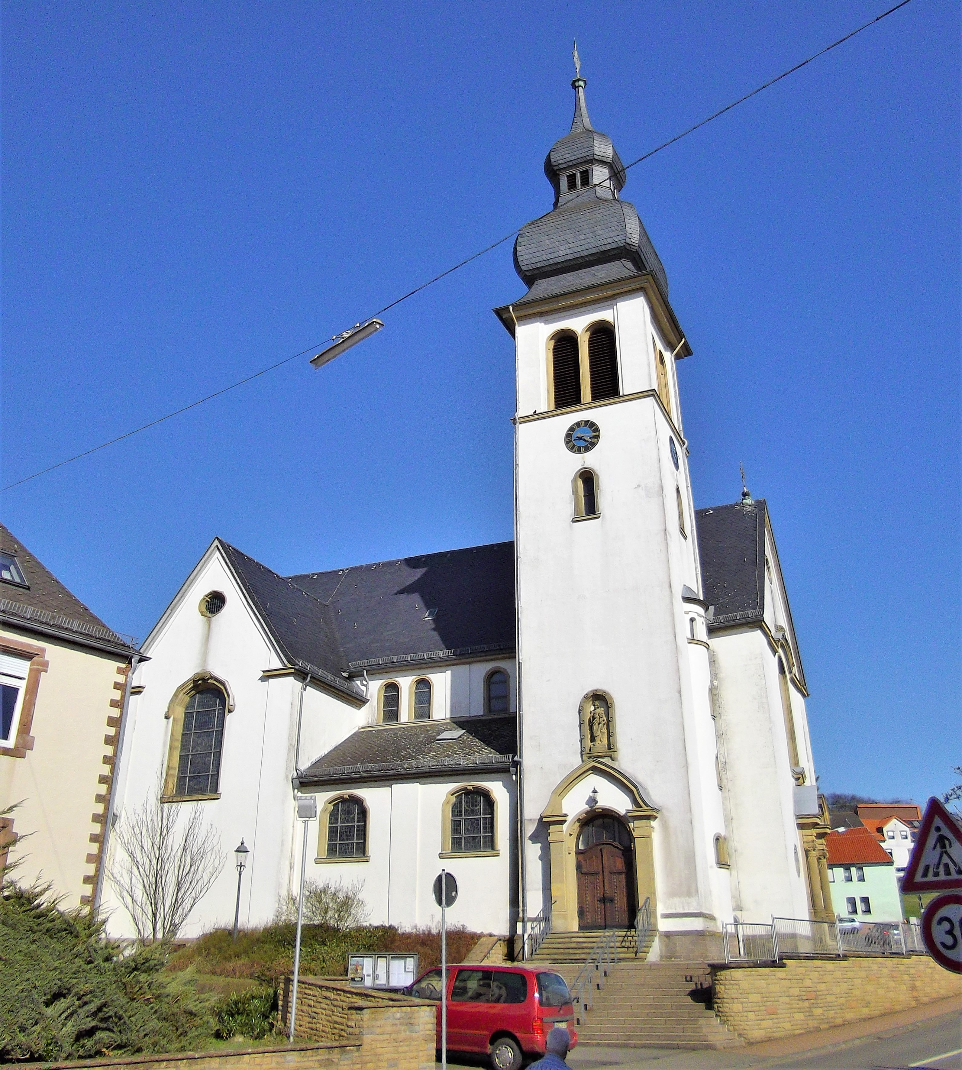 church of scheuern